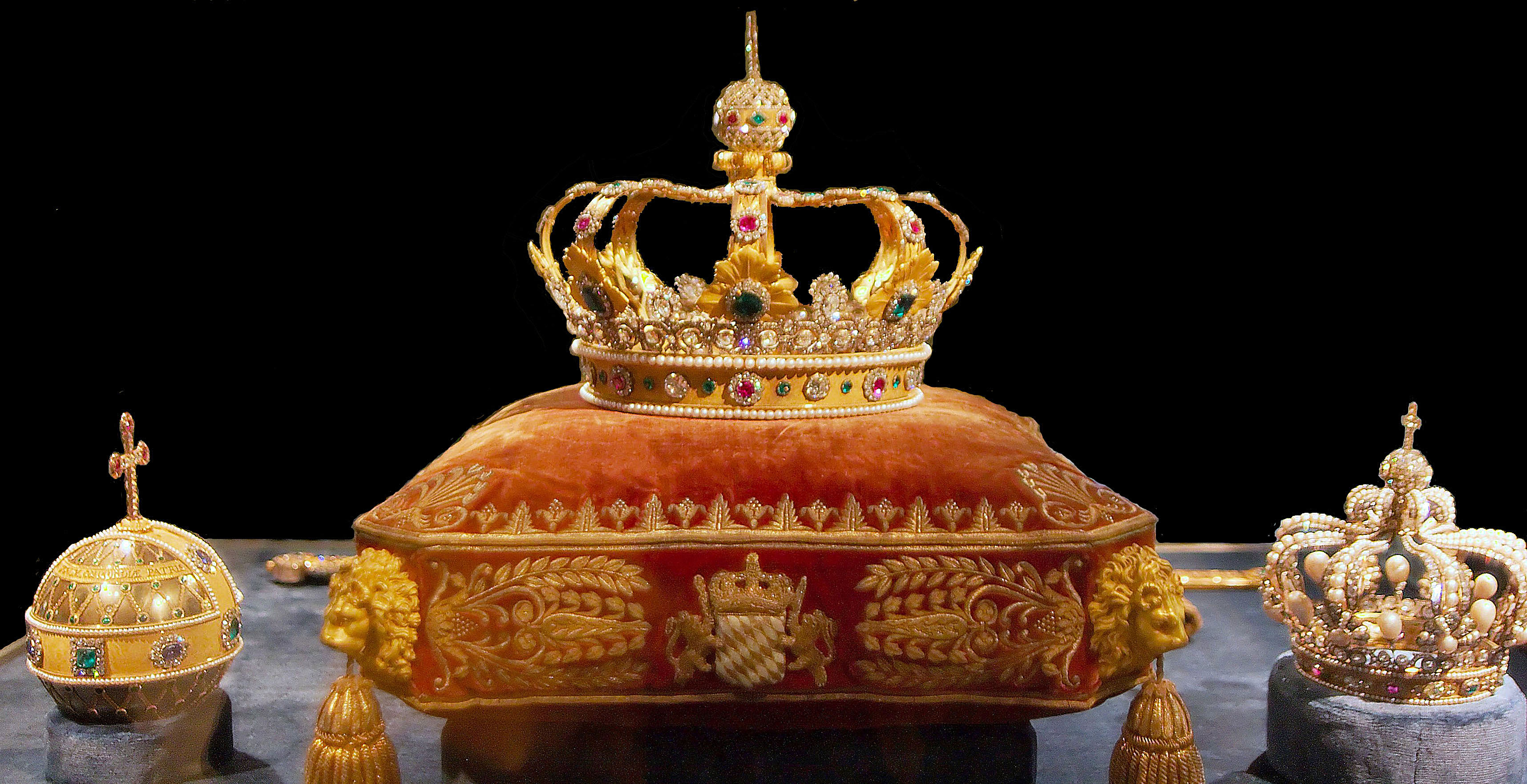 Krone des Königreich Bayern, 1806. Ausgestellt in der Schatzkammer der Residenz München